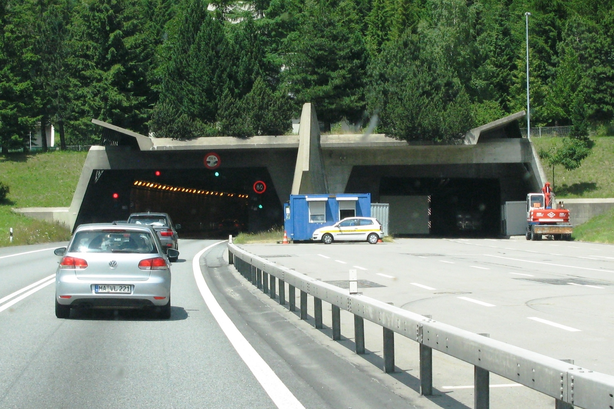 Gotthard-Stroossentunnel Portal Tessin